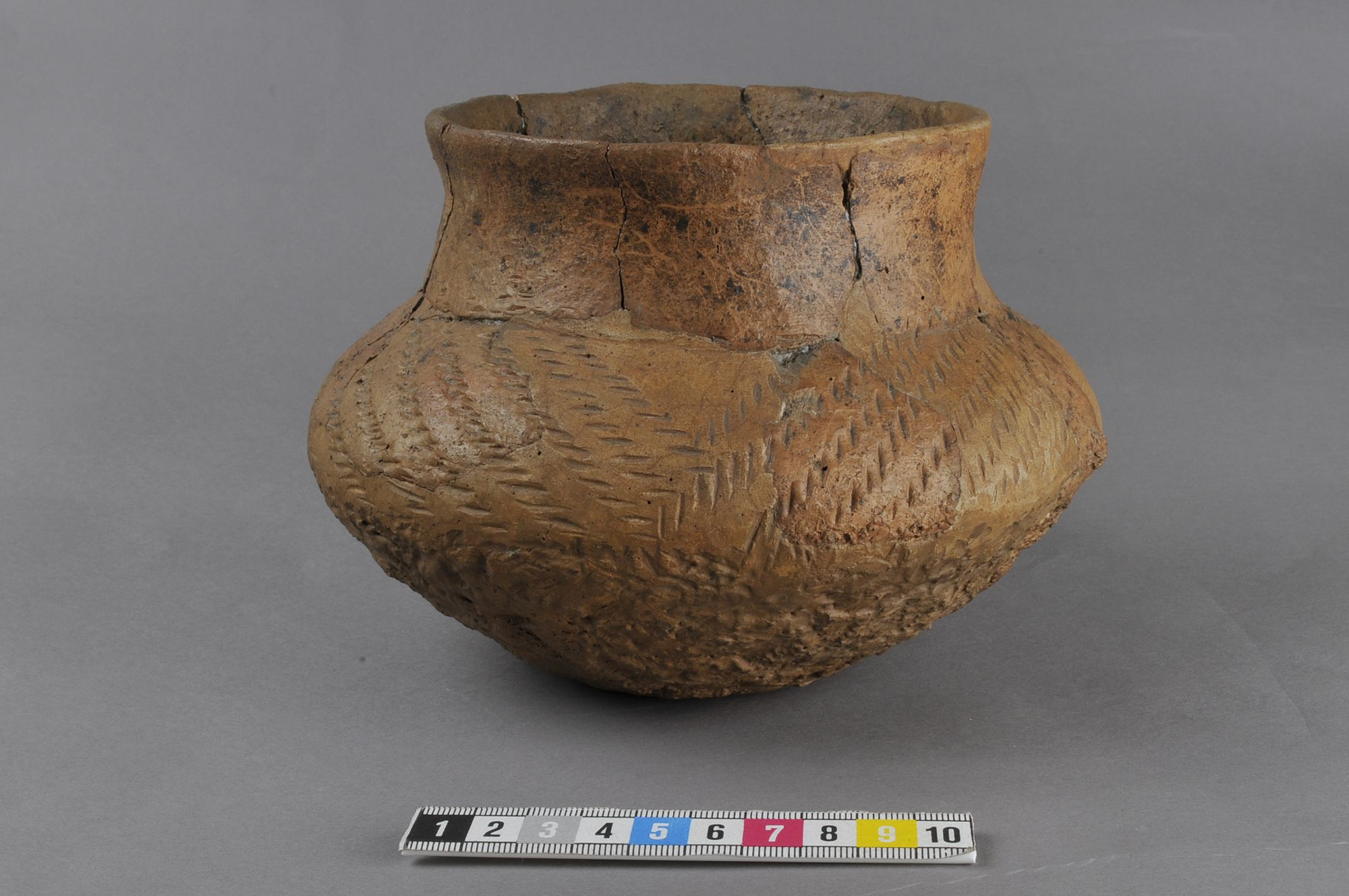 Lerkärl 1699 - 500 fKr. Ringstorp.